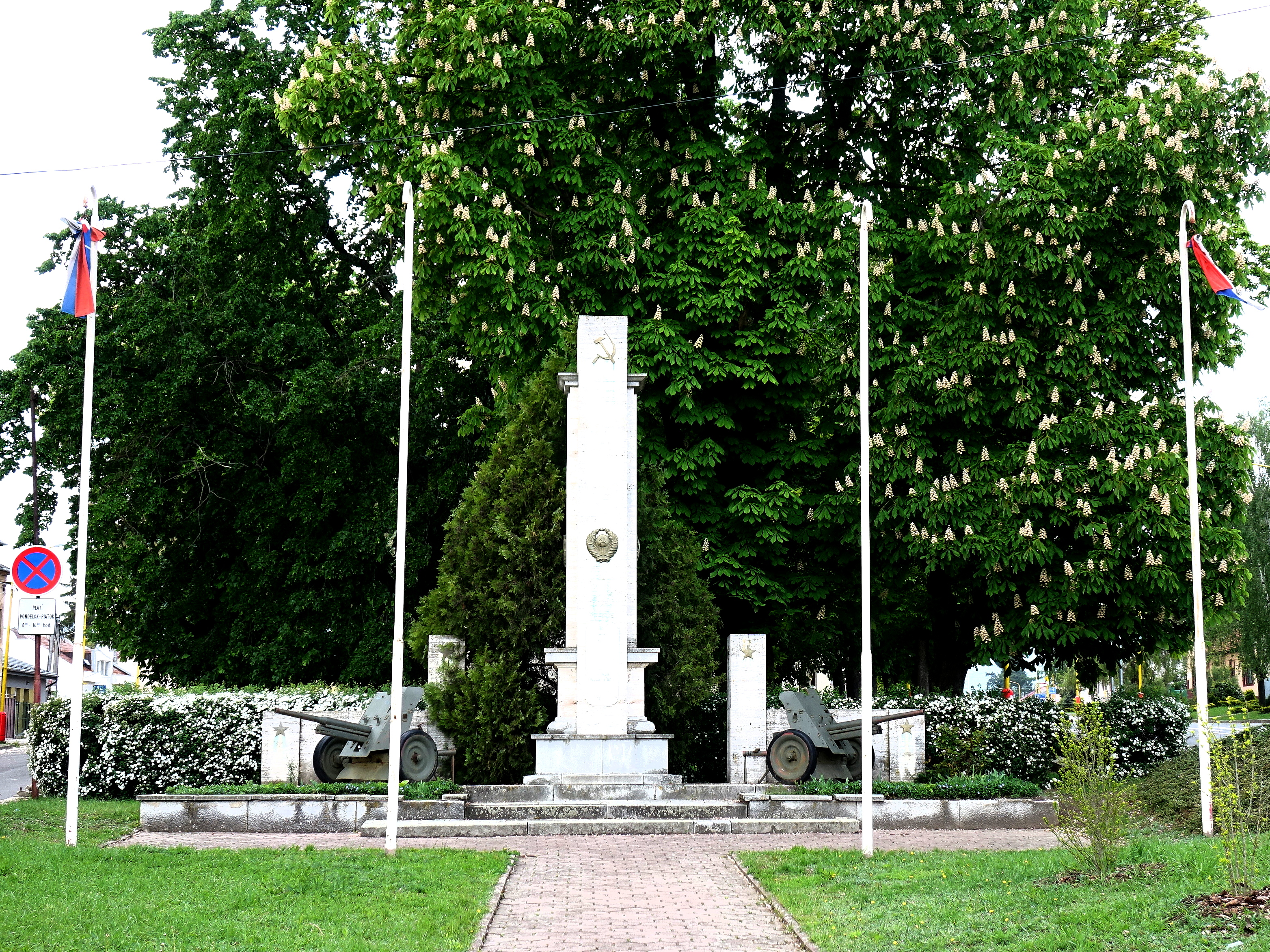 Národná kultúrna pamiatka. Pamätník padlým pred kostolom. Mesto Sečovce. Slovensko.